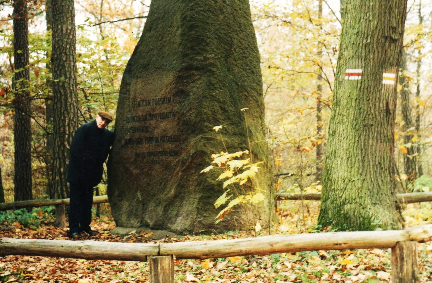 Głaz Leśników. WPN. 11.11.1995r.